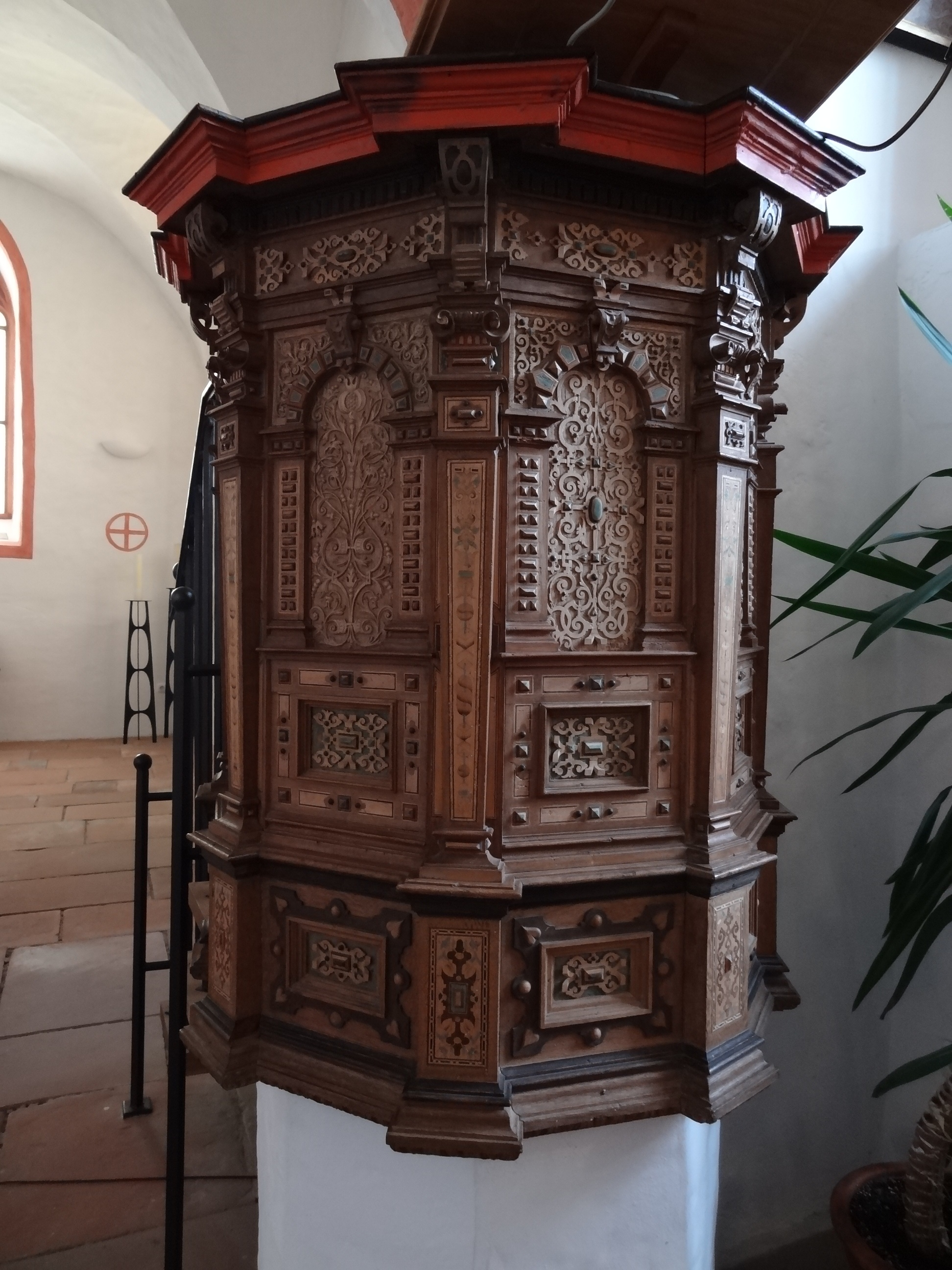 Margarethenkirche (Krofdorf)